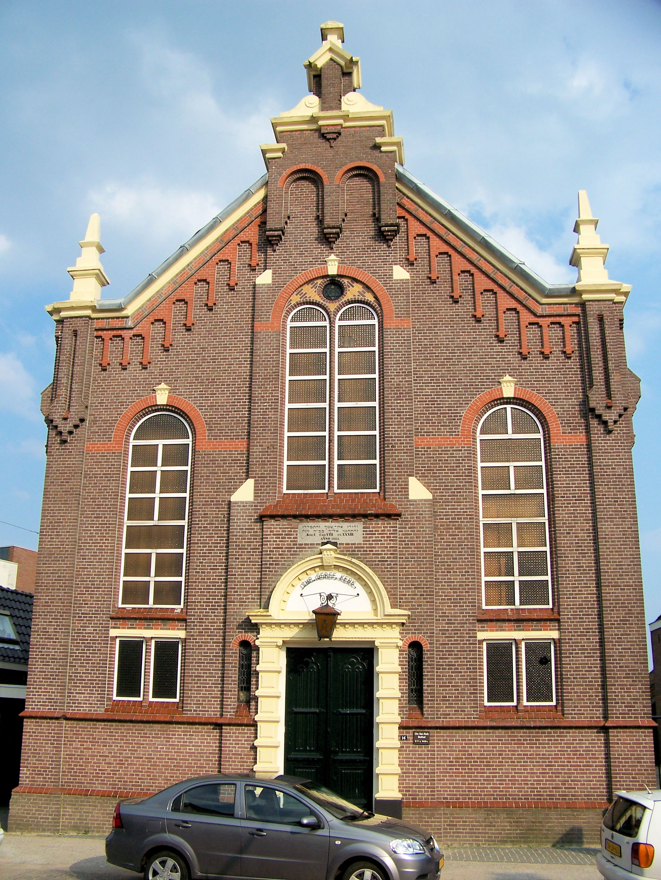 Bethelkerk (1901) in Assen